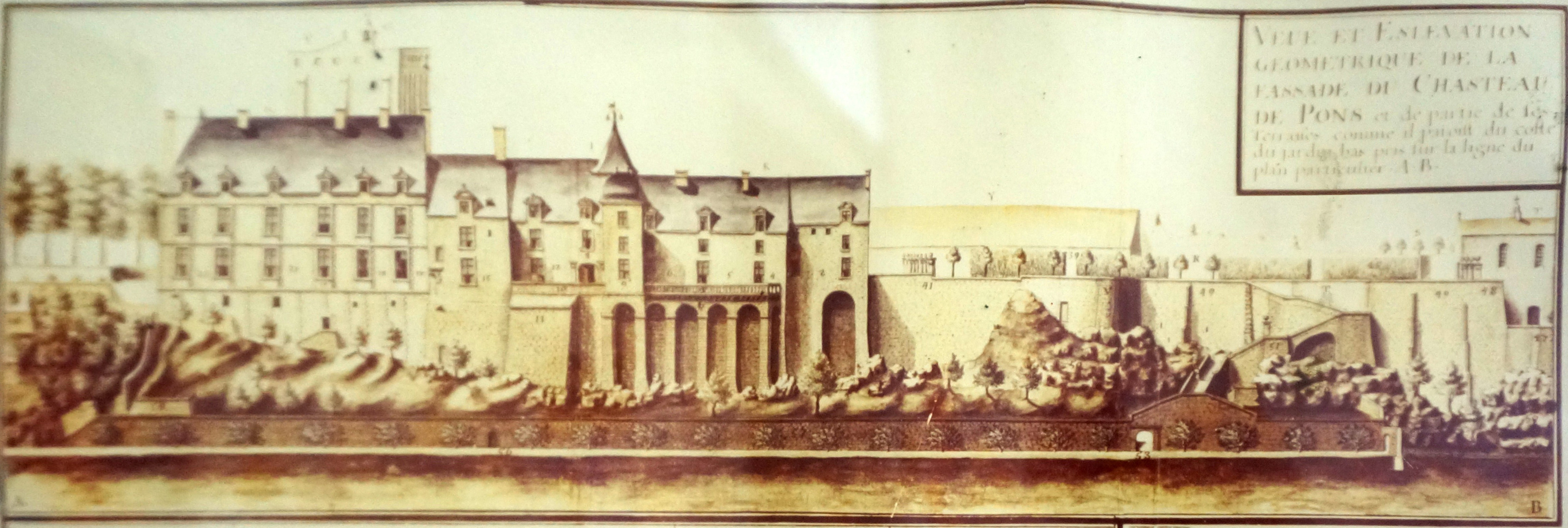 Visible au Musée archéologique de Pons. Plan du XVIII.